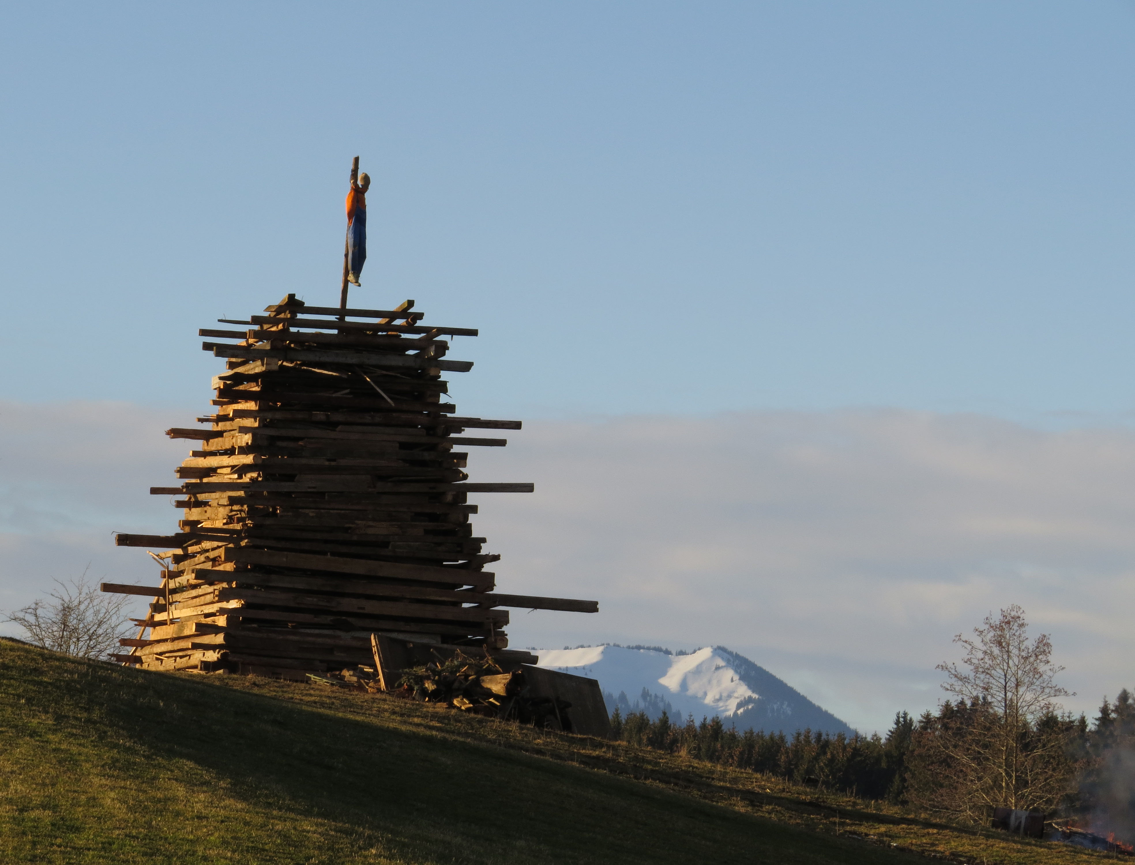 Funken mit Hexe bei Görisried